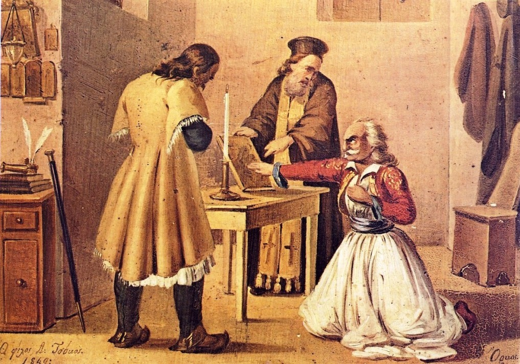 Le Serment Selon la tradition, c'est Theódoros Kolokotrónis, commandant en chef de la Révolution grecque, qui est représenté prêtant serment sur l'Évangile. Huile sur bois de 1849 par Dionysios Tsokos (1820-1862) Pièce du Musée national historique de Grèce exposée à l'Institut et musée Voltaire de Genève (Suisse)